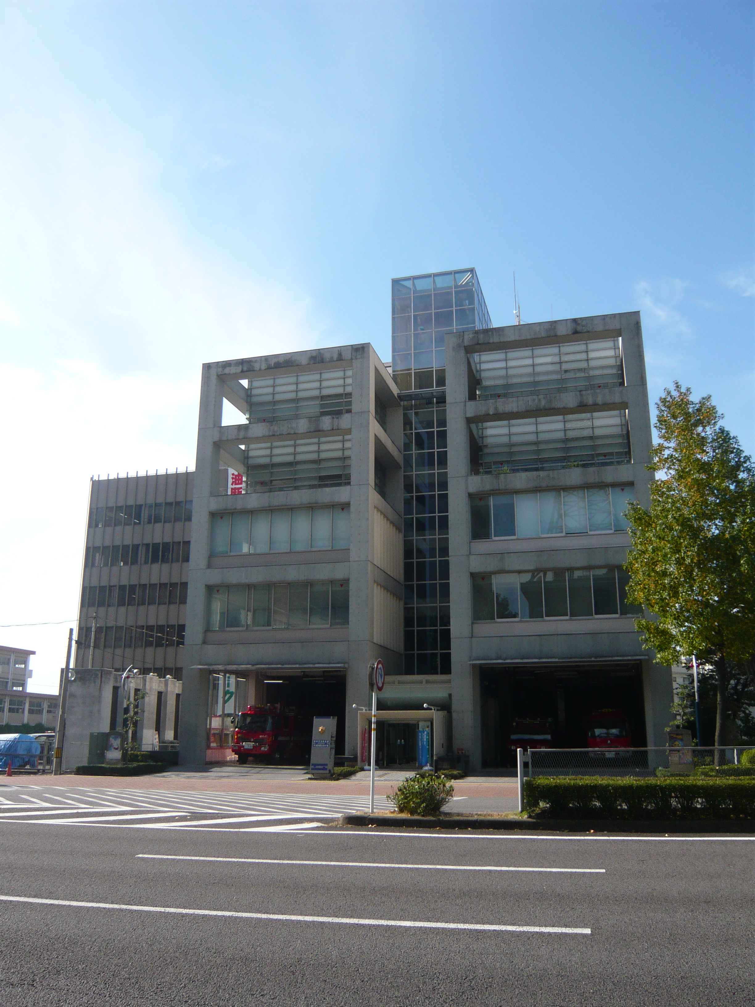 Gifu Fire Department（岐阜市消防本部）, Gifu, Gifu, Japan（岐阜県岐阜市）で撮影。